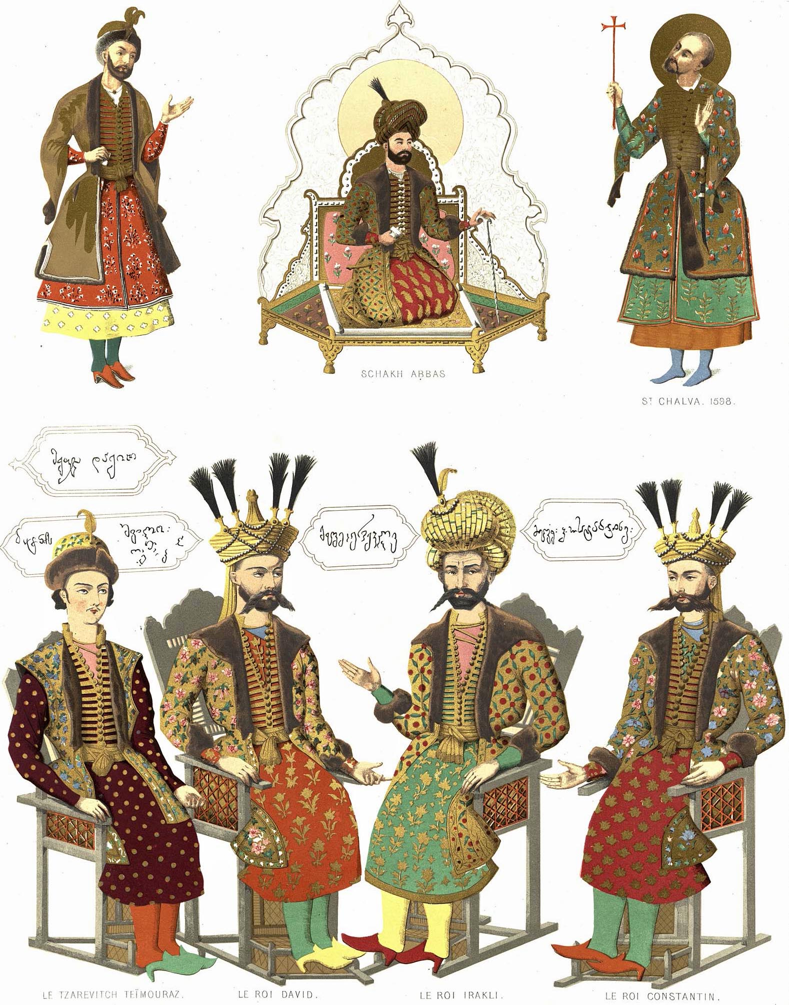 Georgie au XVI siecle. St.Chalva et 4 rois georgiens.